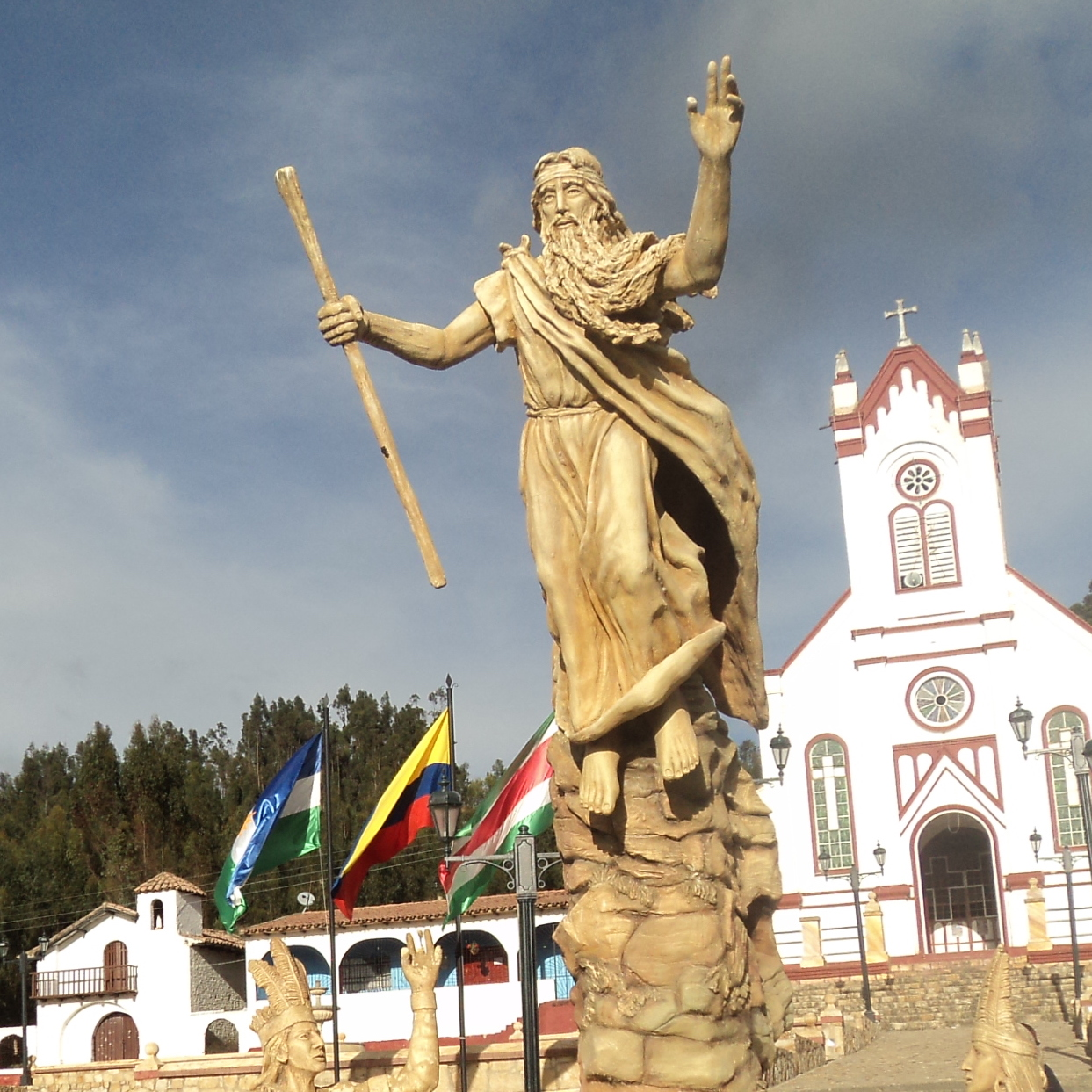 Parque principal de Cuitiva